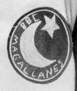 Luis "Camaleón" García con el uniforme del Magallanes.